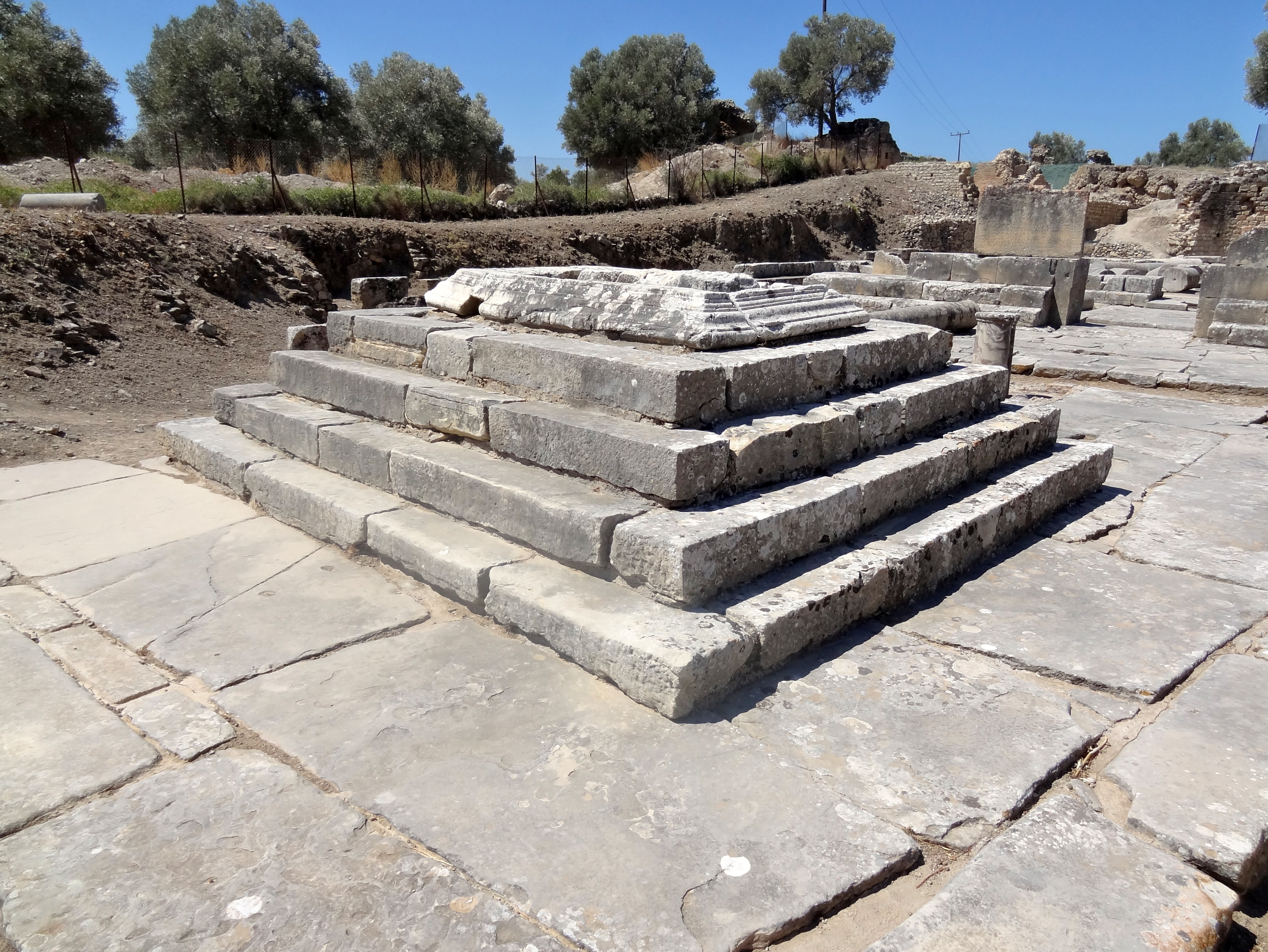 Reste der griechisch-römischen Stadt Gortyn (Γορτύν), Gemeinde Gortyna, Regionalbezirk Iraklio, Kreta, Griechenland